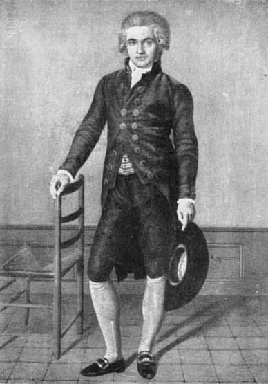 Friedrich Bury (1783-1823), Wachsfarbenmalerei von Johann Heinrich Lips. Der junge Maler und Hausgenosse schloß sich zutraulich an Goethe an, der ihn als "zweiten Fritz" (ist gleich: von Stein) gernhatte. 1790 traf er ihn in Oberitalien, 1800 war Bury sein Hausgenosse in Weimar; 1808 Verkehr in Karlsbad. Beide Male zeichnete Bury den Dichter.